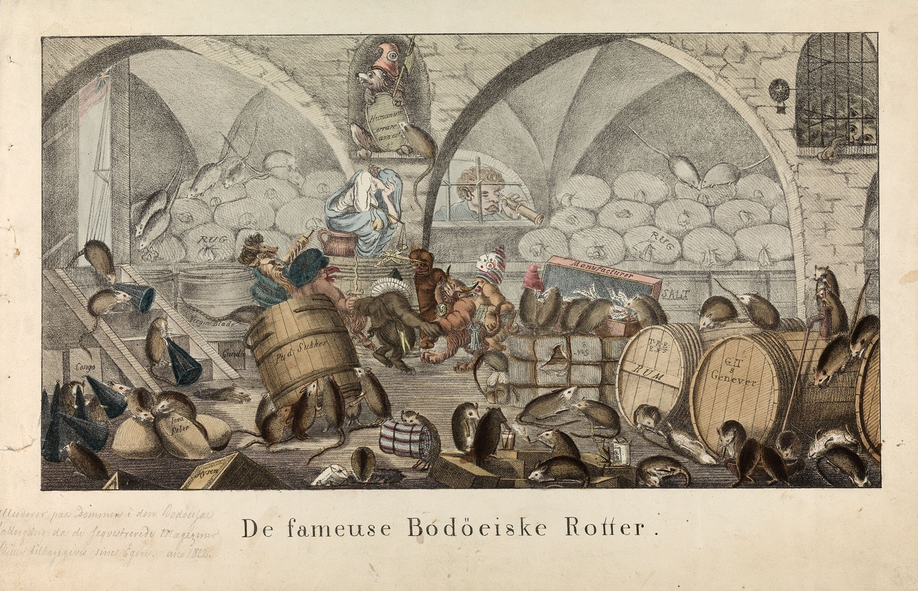 De fameuse Bodöeiske Rotter